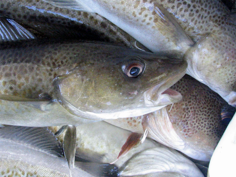 Morues fraîchement pêchées aux Îles-de-la-Madeleine en 2006